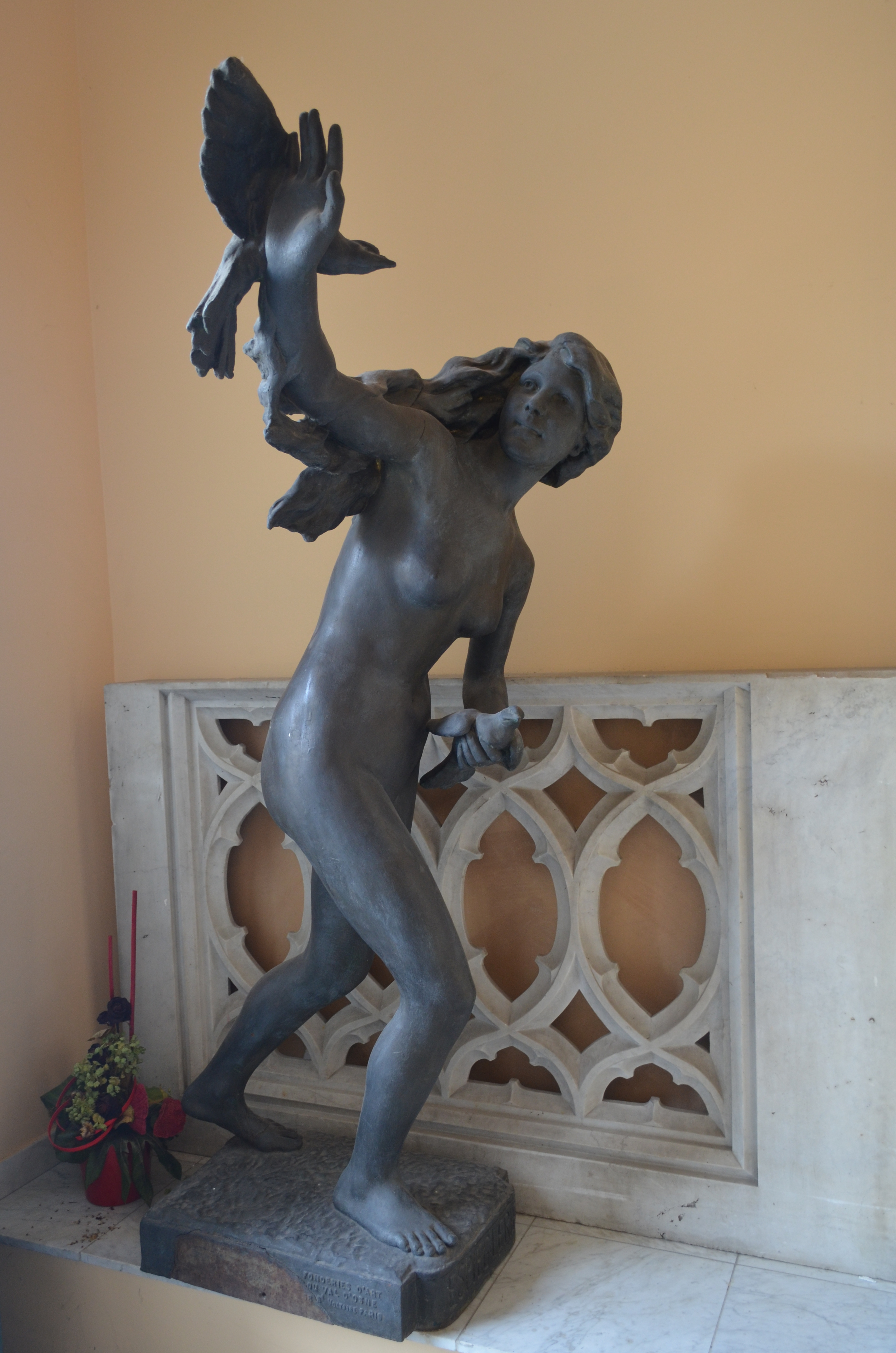 Espièglerie (1899) - Fonderie du Val d'Osne - Charles Théodore Perron (1862-1934) - exposée à la librairie Molière (Charleroi)